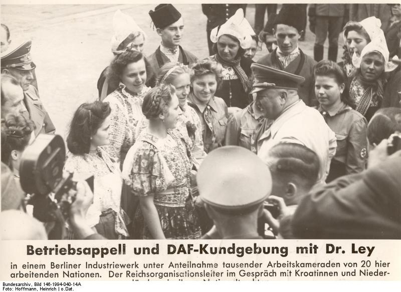 Betriebsappell und DAF-Kundgebung mit Dr. Ley in einem Berliner Industriewerk unter Anteilnahme tausender Arbeitskameraden von 20 hierarbeitenden Nationen. Der Reichsorganisationsleiter im Gespräch mit Kroatinnen und Niederländern in ihren Nationaltrachten Presse-Hoffmann